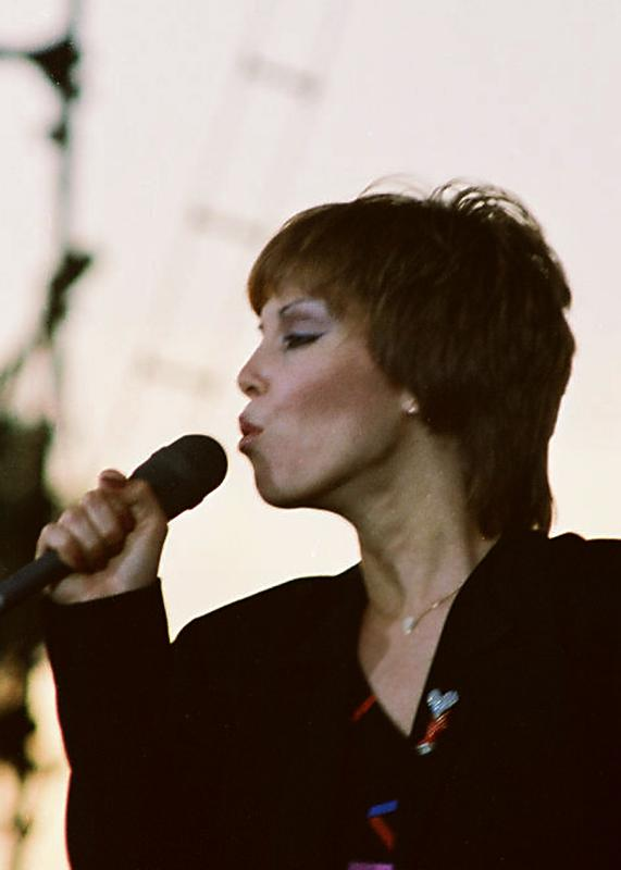 Pat Benatar, live, 2007-09-07